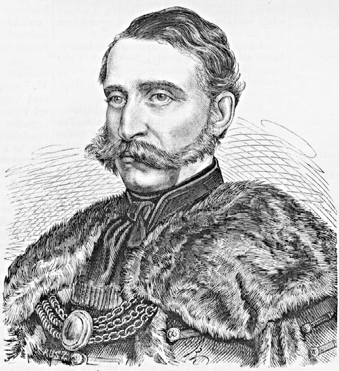 gróf Festetics György (1815–1883) politikus, miniszter portréja. Rusz Károly metszete